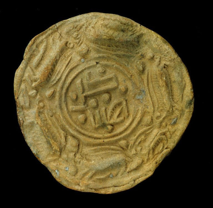 Broodstempel met Arabische tekst in Kufisch schrift "kull hani'an", wat zoveel betekent als "eet met smaak". De stempel werd gebruikt om een tekst in het deeg aan te brengen voordat het brood de oven inging. In dit geval is de tekst positief aangebracht wat betekent dat het uiteindelijk in spiegelbeeld te lezen was op het brood (Watson 2004 p. 103). Datering is 9e of 10e eeuw na Christus.